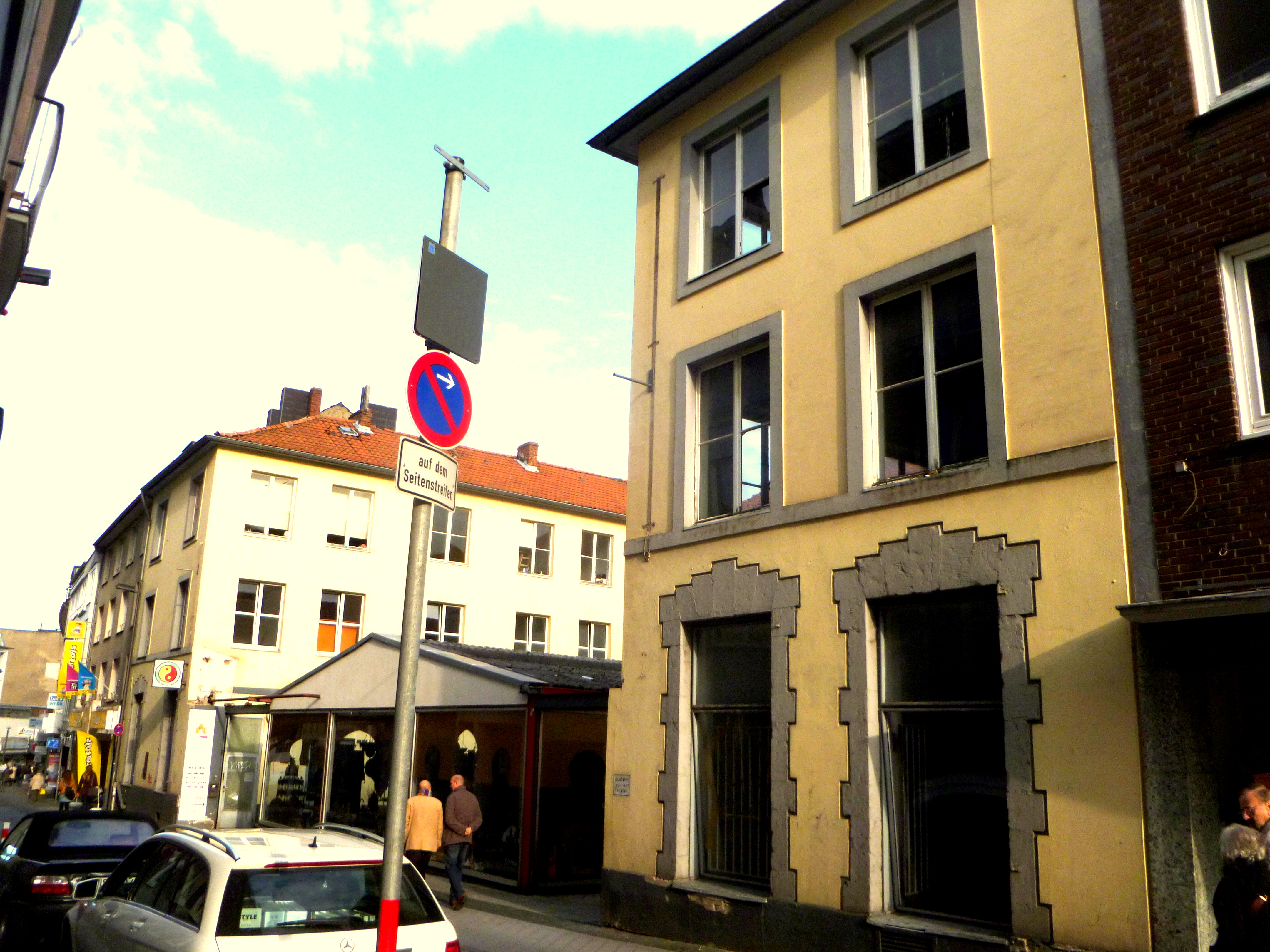 Baudenkmal in Aachen-Mitte; Architekt: Laurenz Mefferdatis; Innenarchitekt: Johann Joseph Couven, nur Parterre noch Original